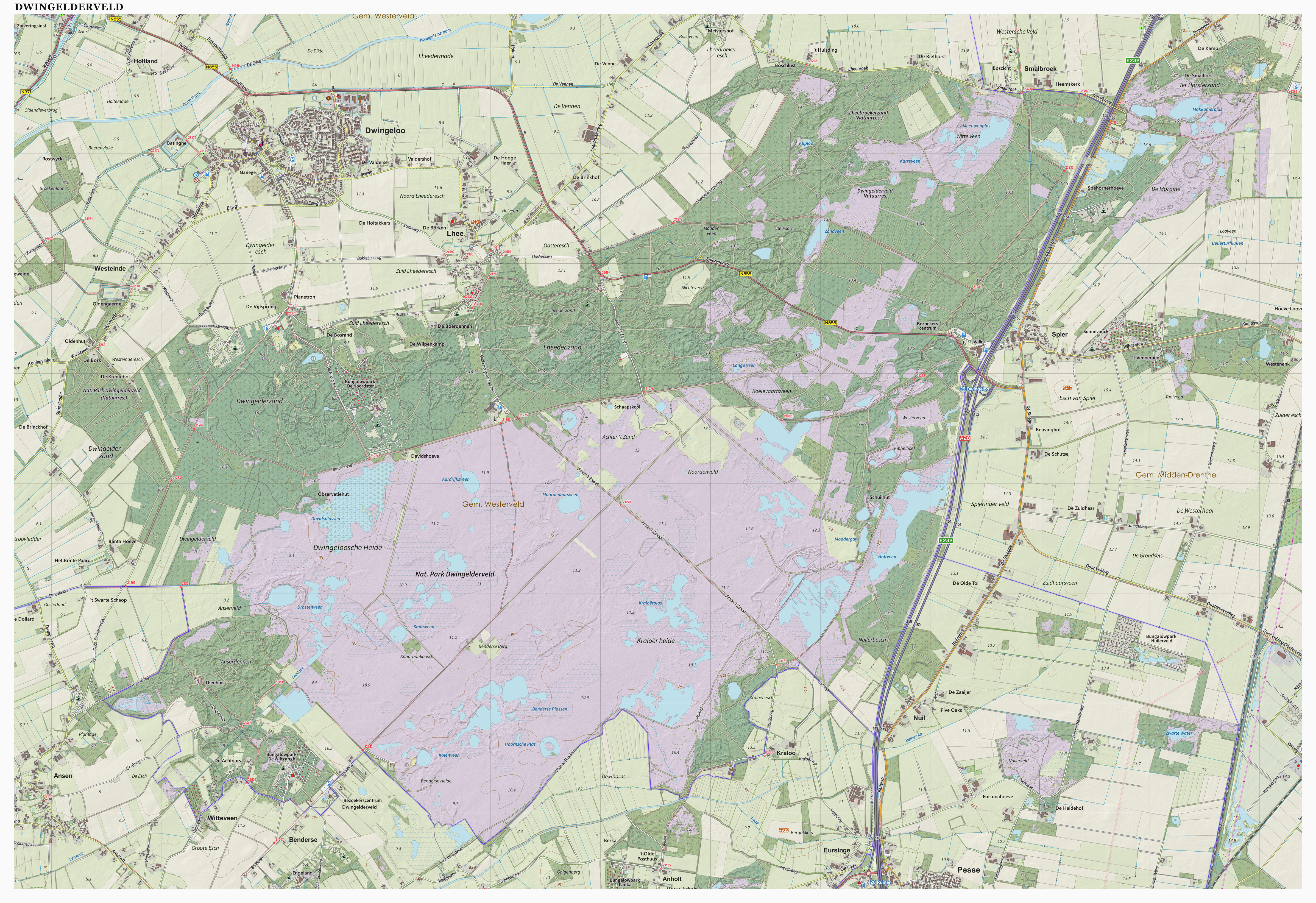 Topografische kaart van het Dwingelderveld (natuurgebied). Resolutie: 400 pixels/km. Samengesteld door Jan-Willem van Aalst op basis van de GML open geodata van de BRT/Top10NL (basisregistratie Topografie, Kadaster), vrijgegeven door Kadaster onder de Creative Commons BY licentie. Additionele gegevens uit BAG uit de Open Street Map en uit de Risicokaart. Zie ook de Legenda.